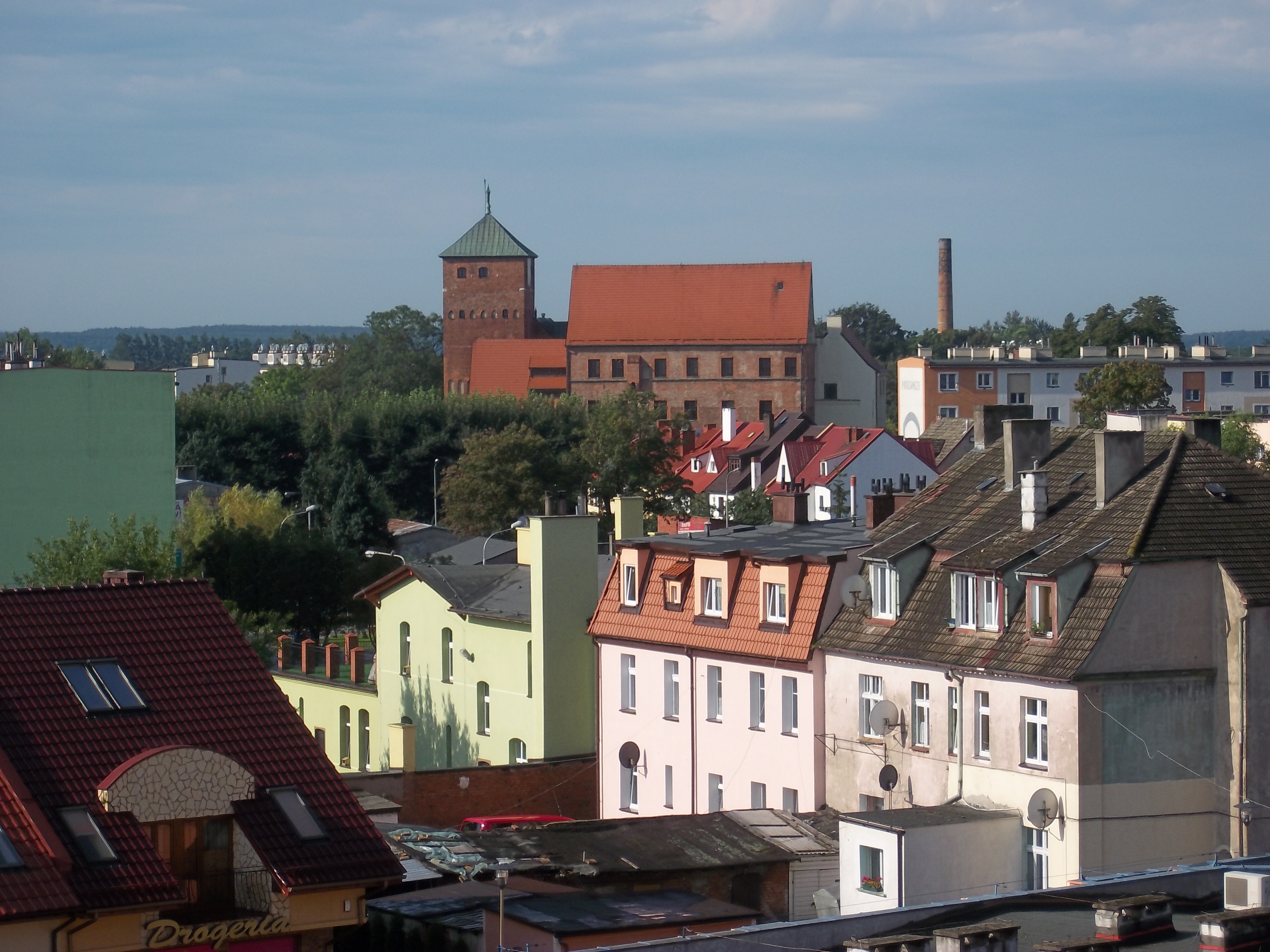 Darłowo - widok na Zamek Książąt Pomorskich